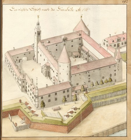 Rigaer Schloss aus der "Sammlung Liefländischer Monumente..." Vol. 10, part 2 von Brotze